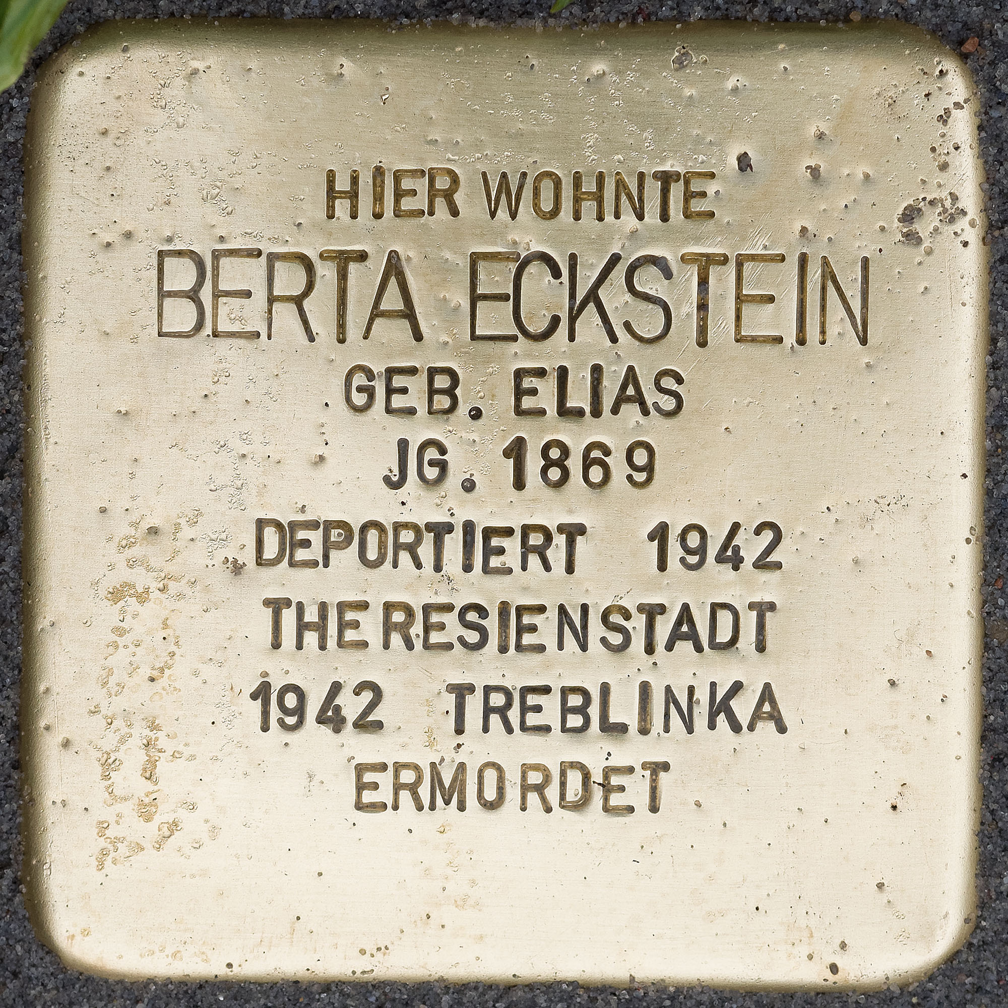 Stolpersteine Suechteln: Eckstein, Berta